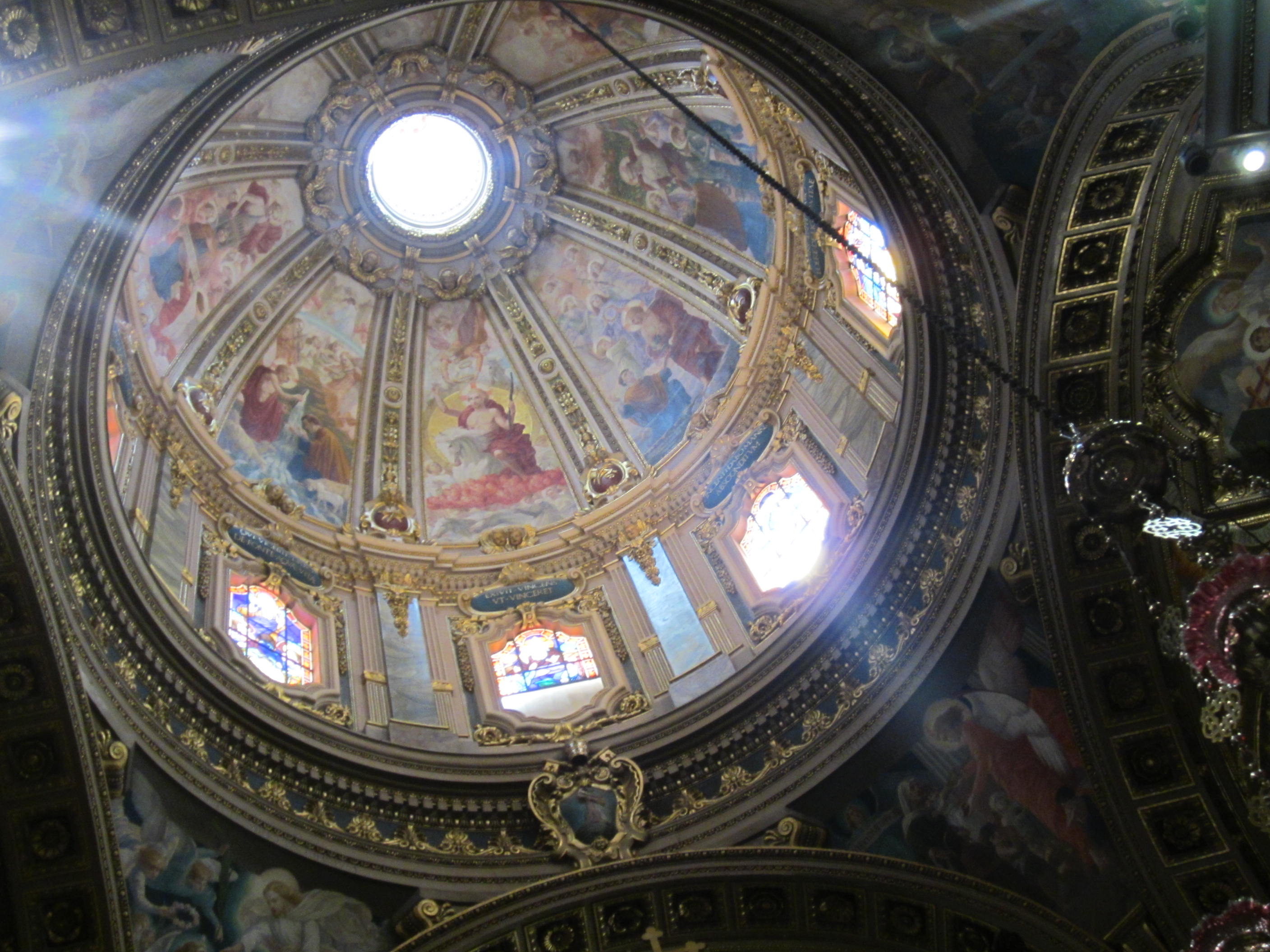 Cupola della Chiesa di San Giorgio a Victoria, Gozo